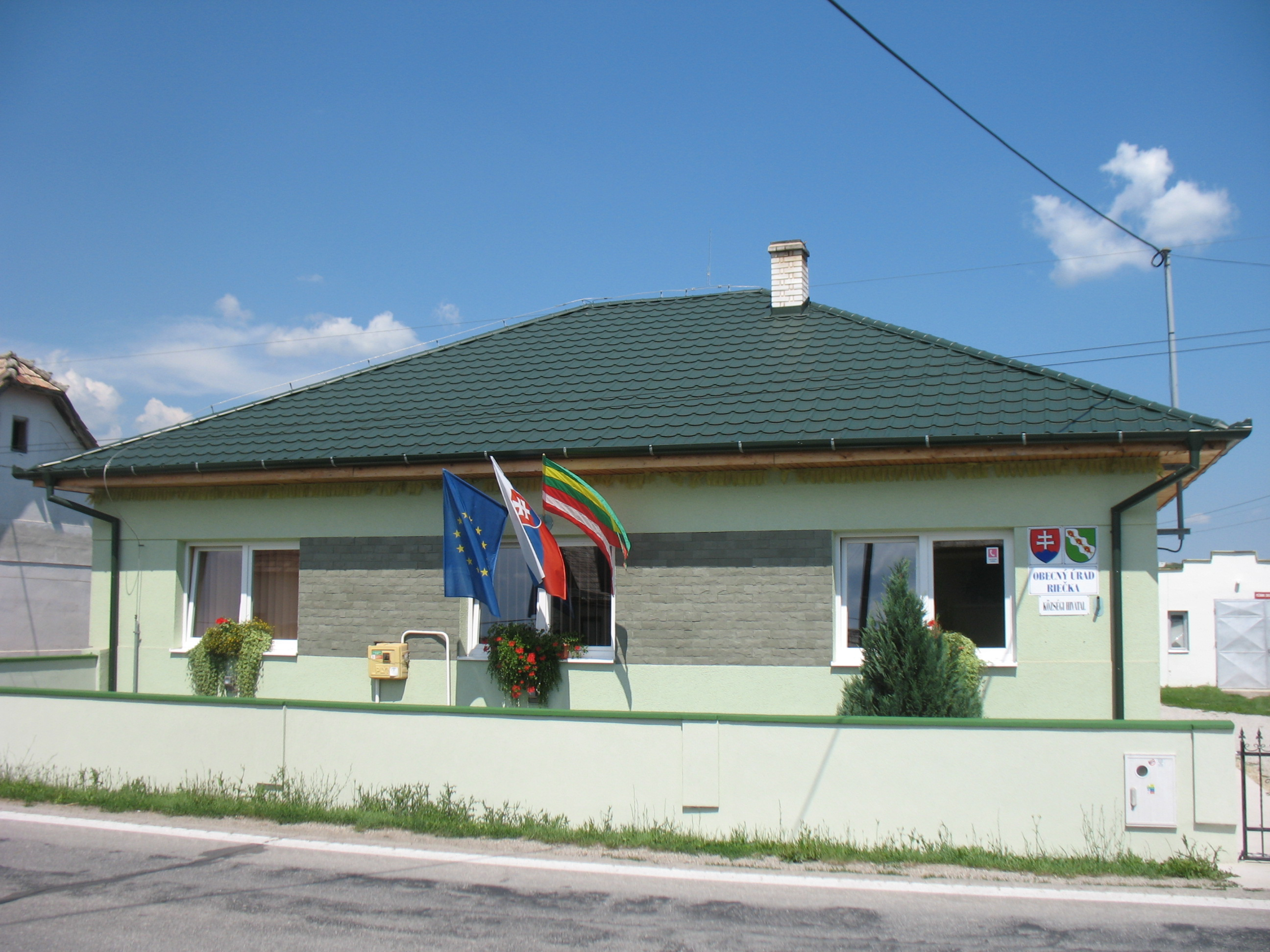 Sajórecske